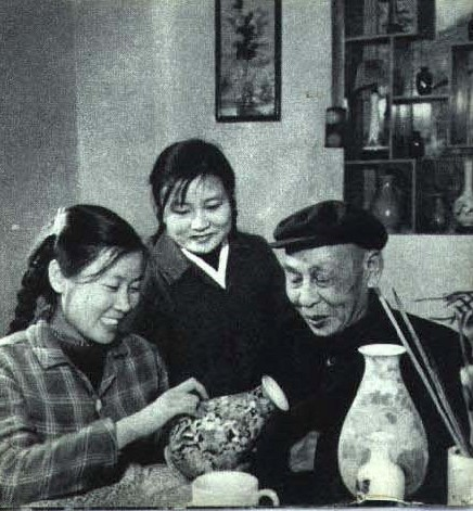 1964-09 1964年 右侧为醴陵瓷器工匠吴寿裿